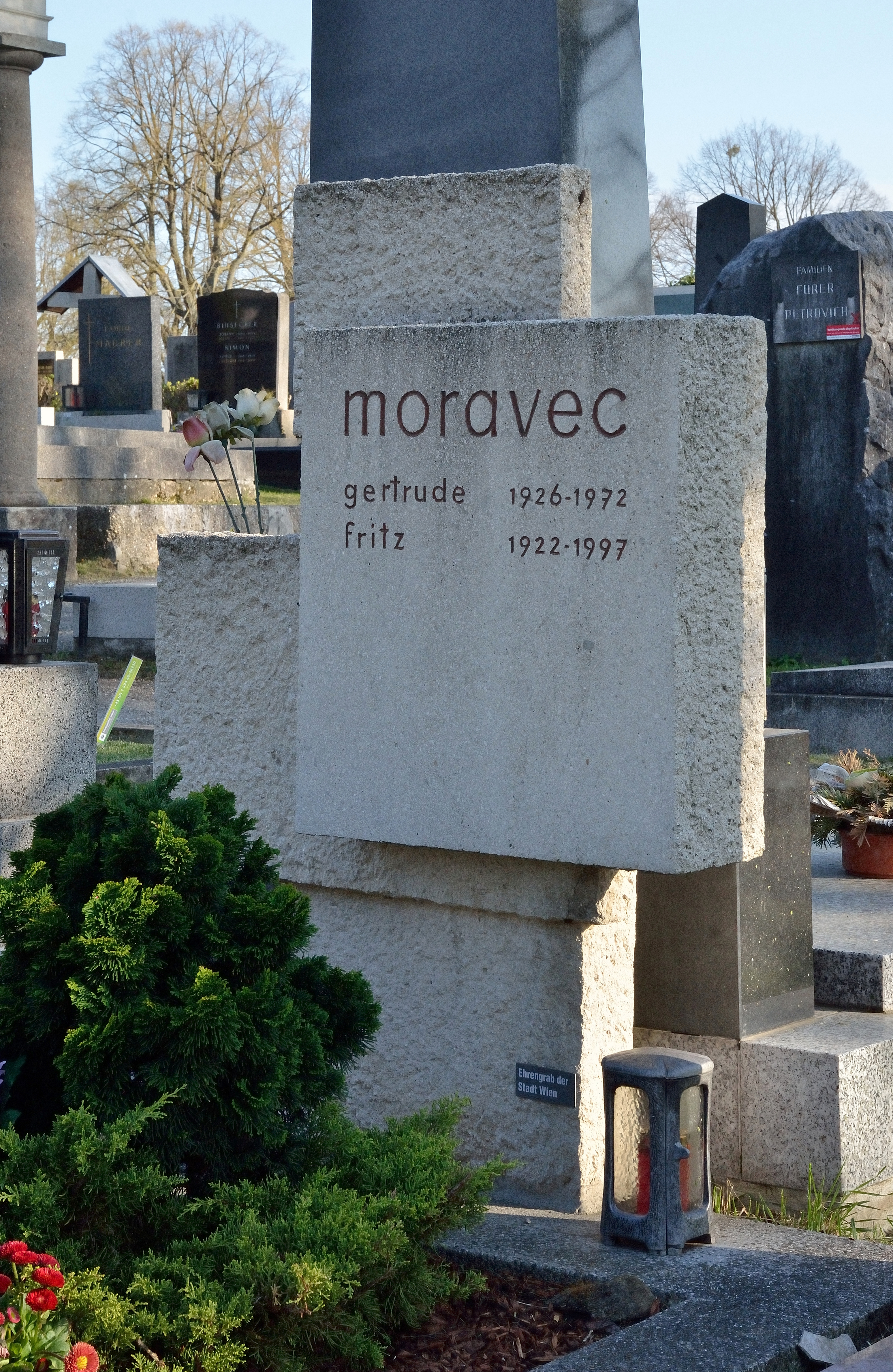 Das Grabmal für Fritz Moravec und Gertrude Moravec liegt auf dem Hietzinger Friedhof, Gruppe 18, Reihe 7, Nr. 225.